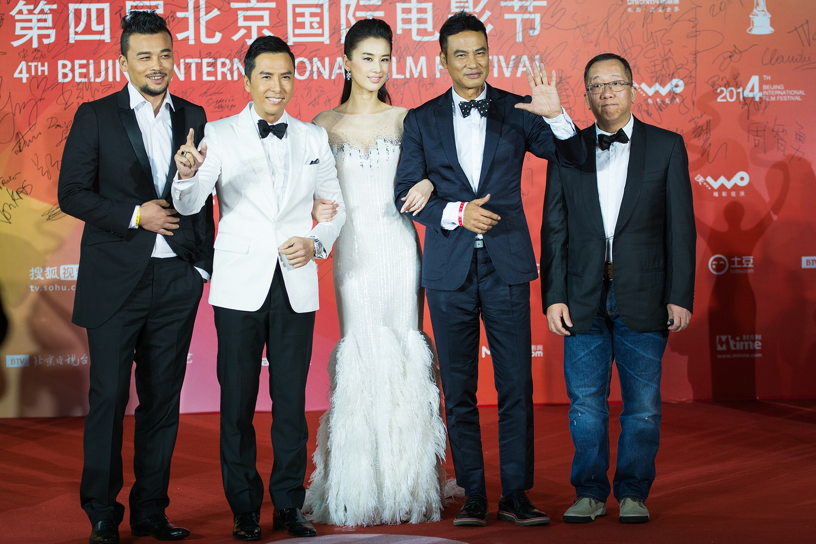 电影《冰封：重生之门》剧组亮相，甄子丹、黄圣依、任达华等现身红毯。